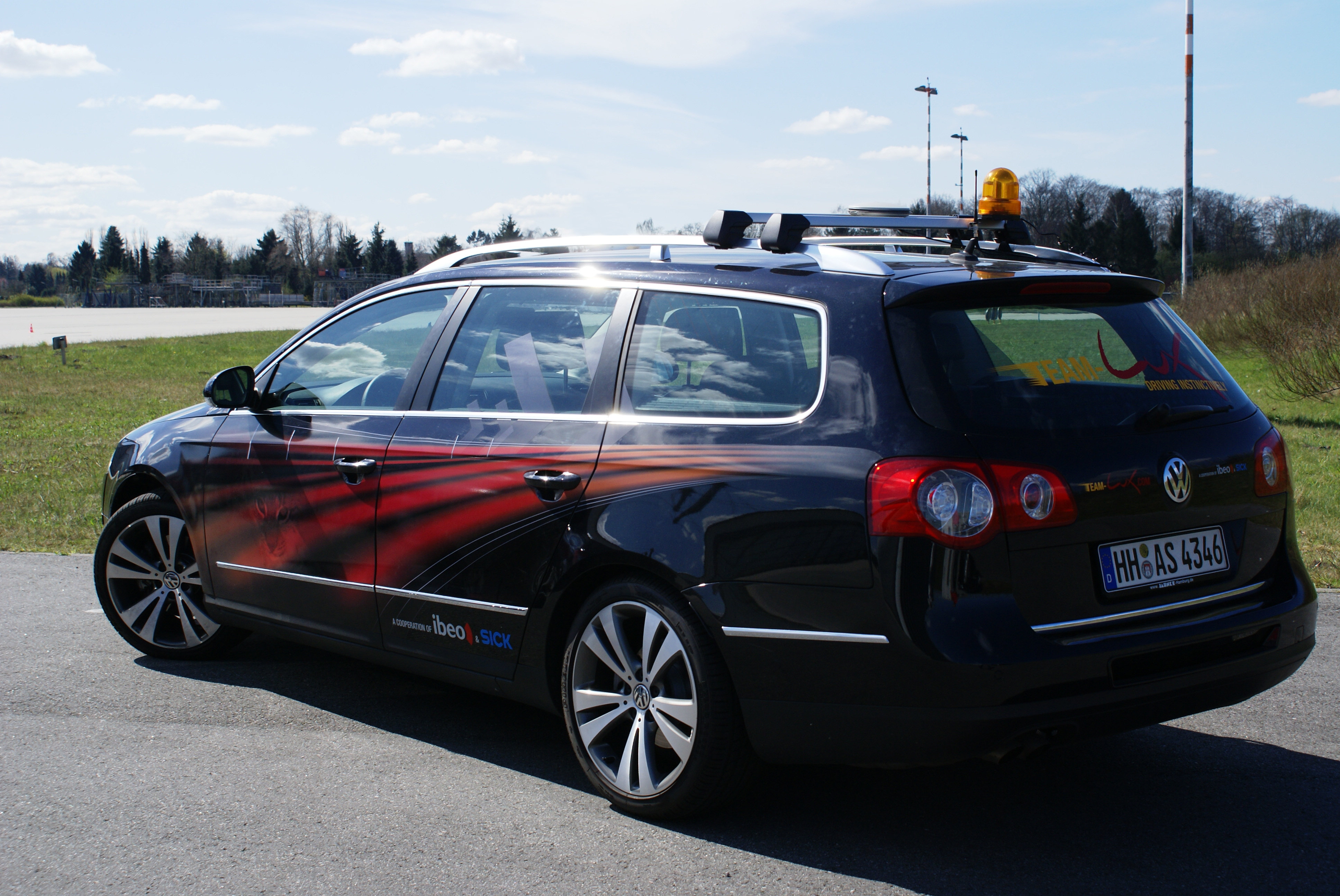 Autonomes Fahrzeug "Lux" des Team-LUX